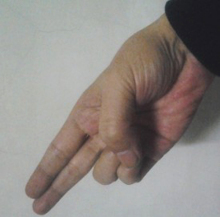 Jian zhi (sword finger) (剑指)